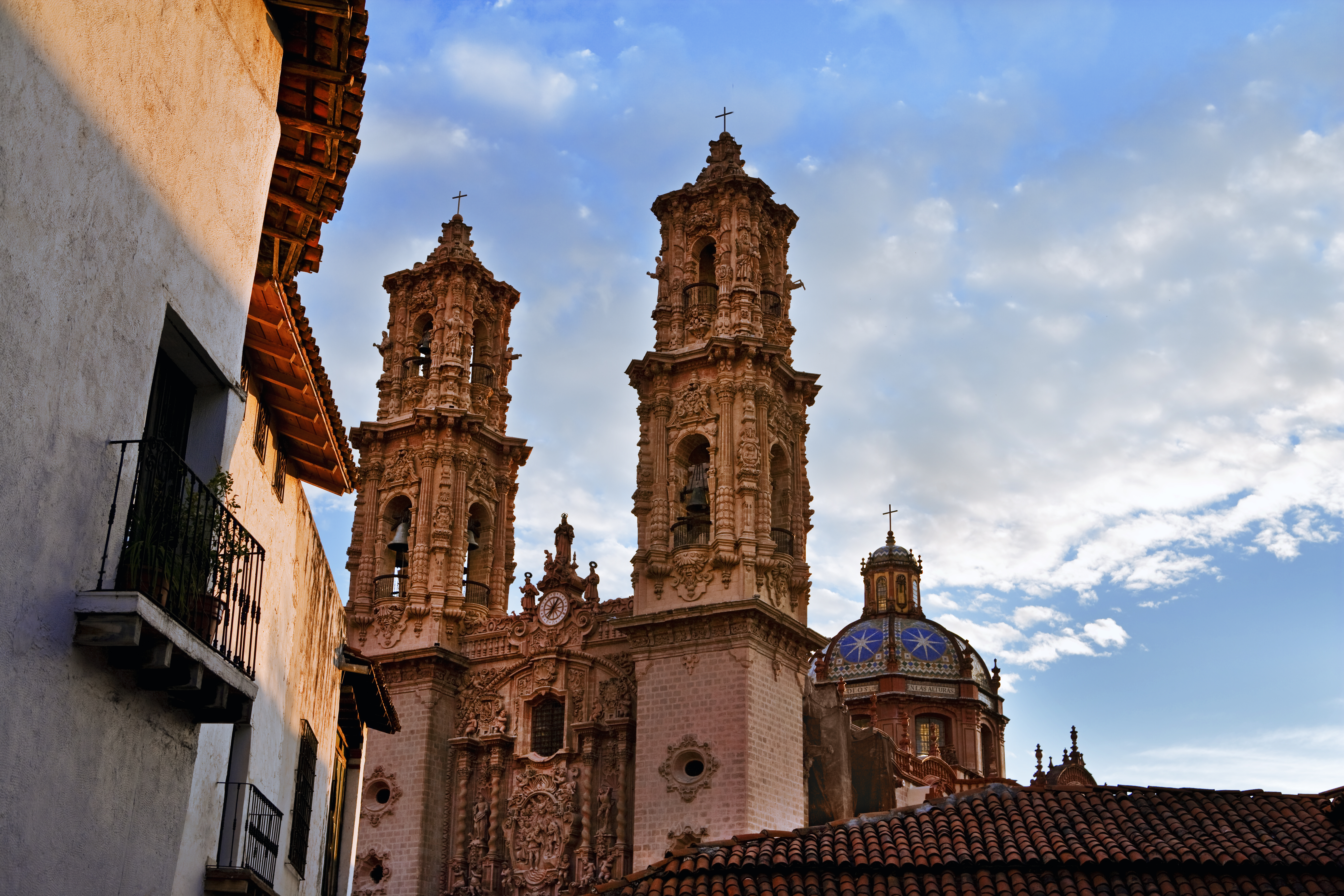 Taxco, Guerrero